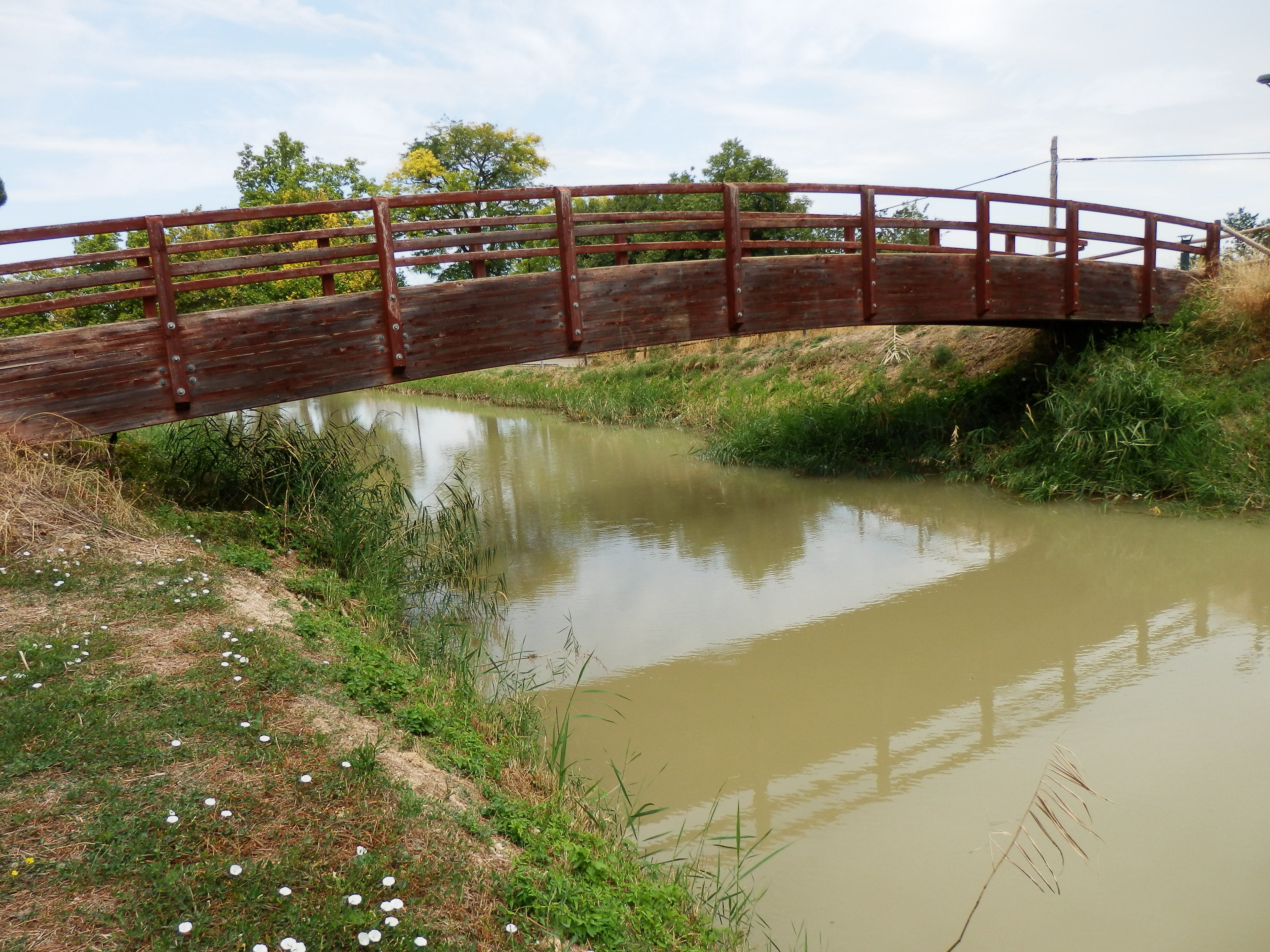 Canal Imperial de Aragón en los montes de Torrero de Zaragoza.